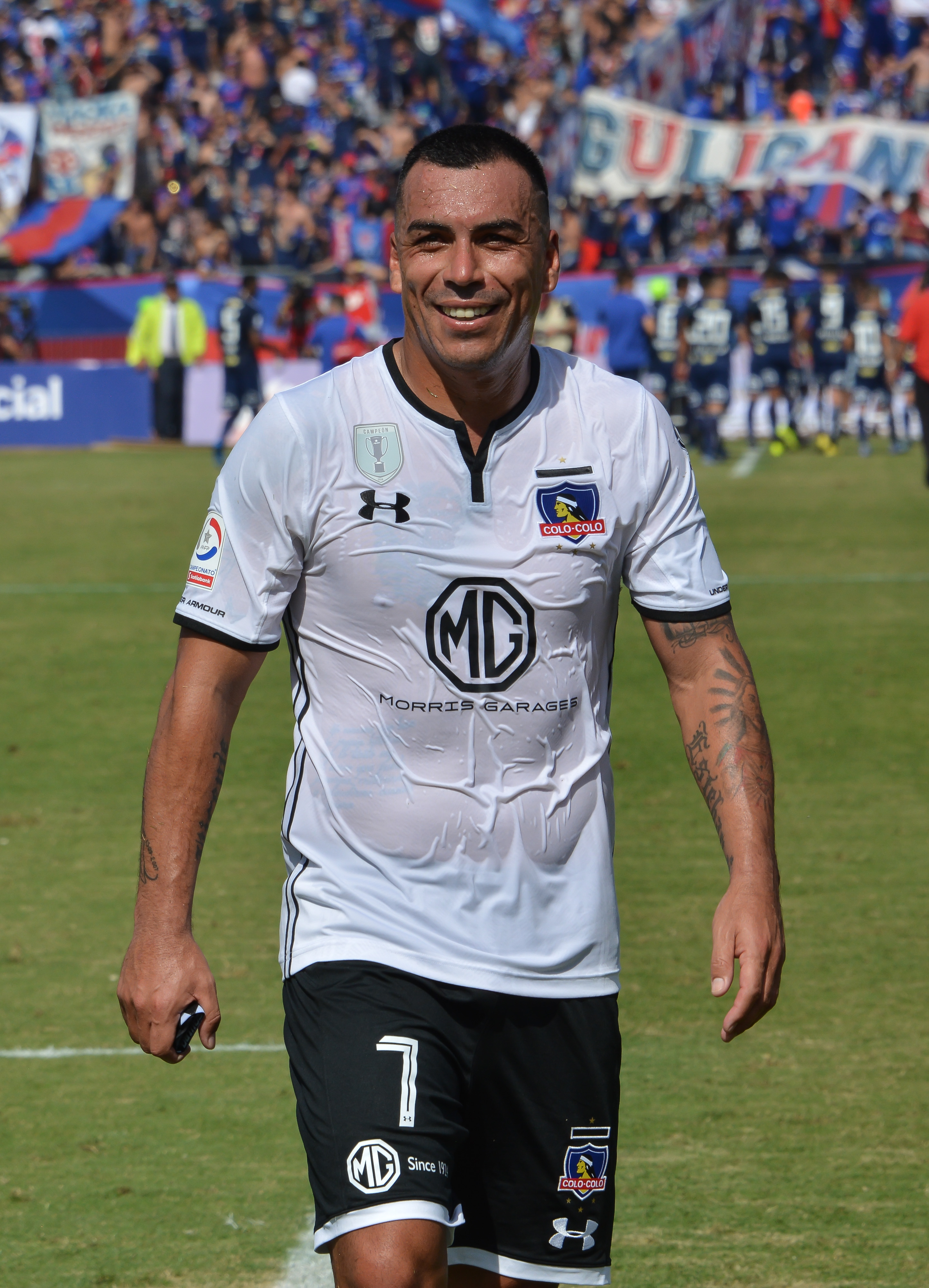 Universidad de Chile v Colo-Colo, Estadio Nacional, Santiago, Chile.